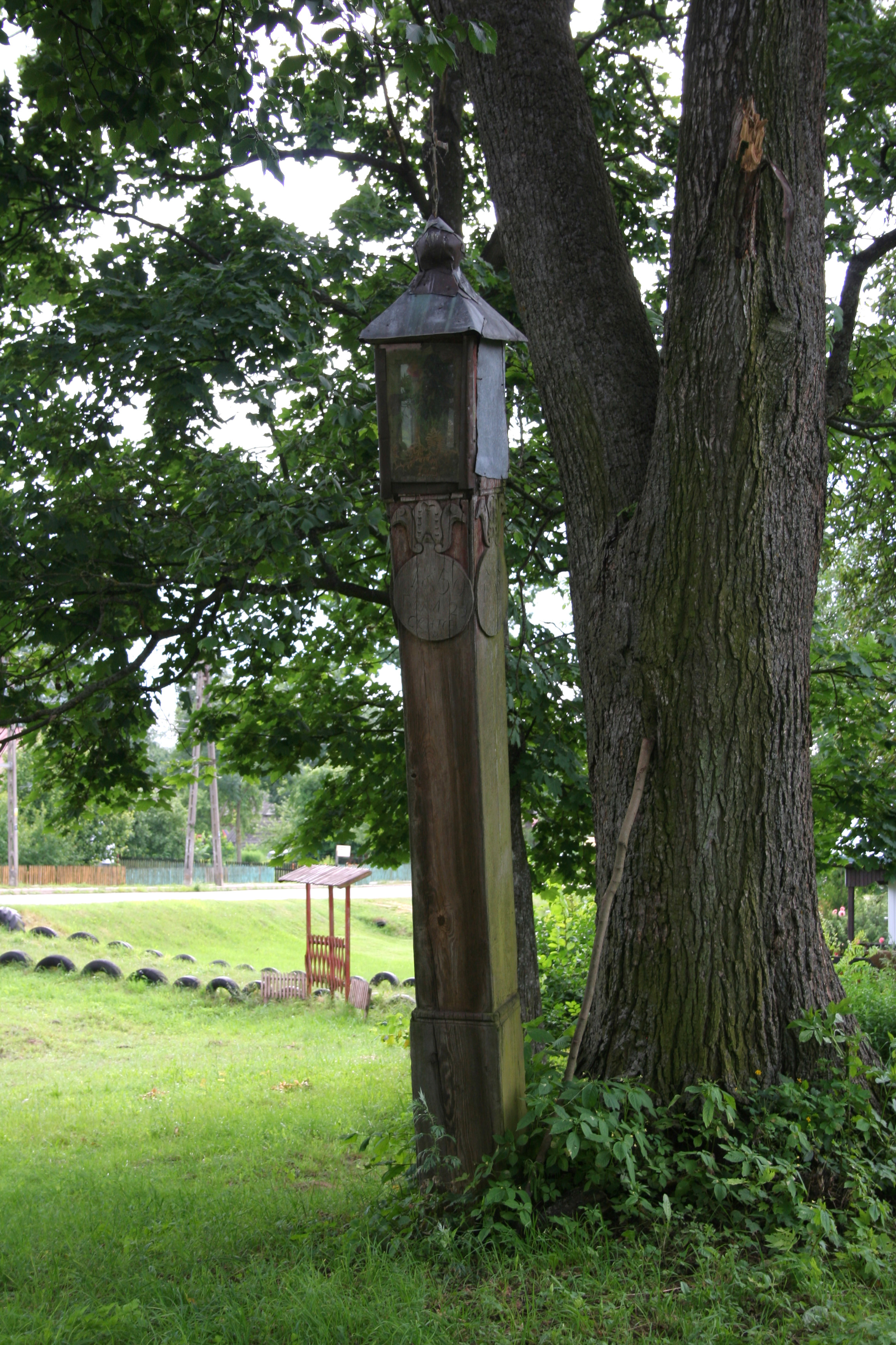 Przydrożna kapliczka słupowa w Klejnikach.